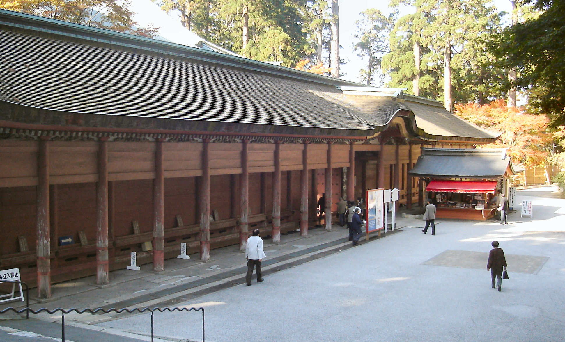 Enryakuji Konponchudo , siga Japan